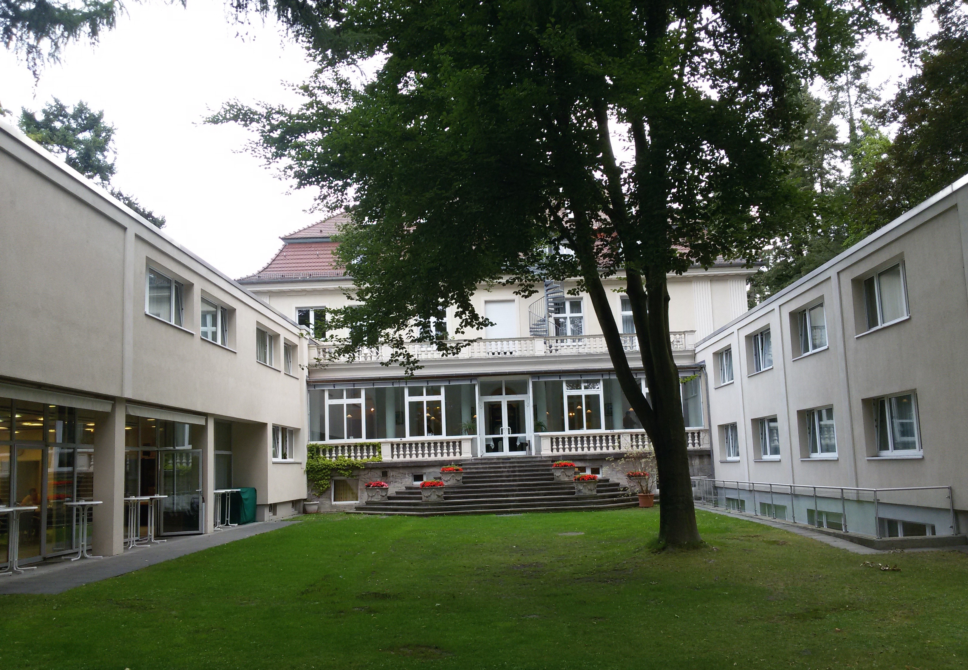 Das Bild zeigt den Innenhof der Europäische Akademie Berlin